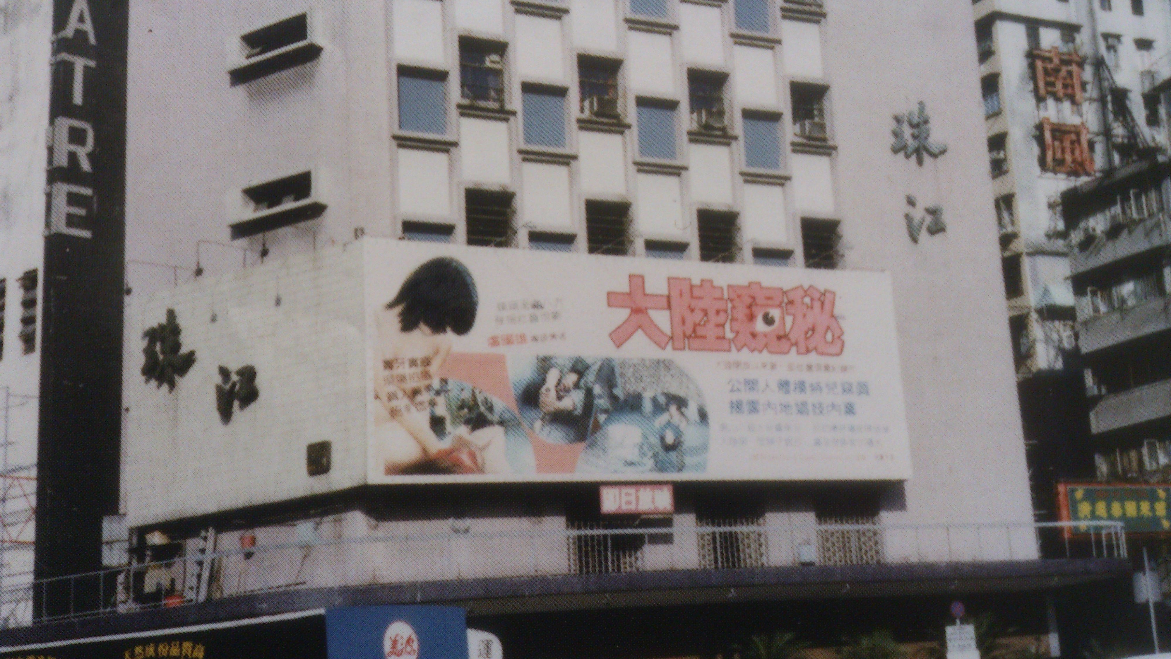 To Kwa Wan, Hong Kong